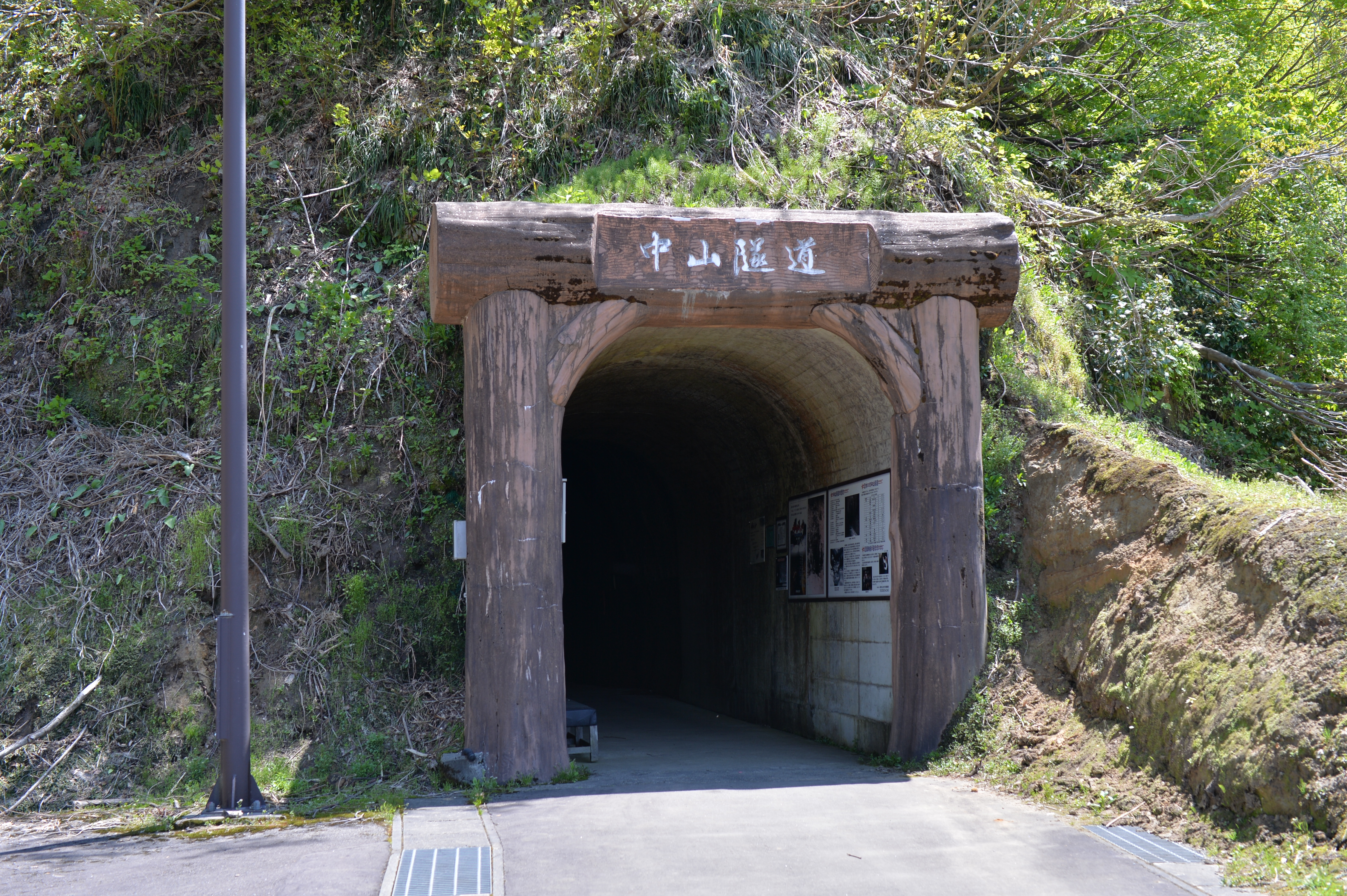 国道291号の旧・中山トンネル（中山隧道）の山古志側坑口。新潟県長岡市山古志東竹沢（旧・山古志村小松倉地区）。